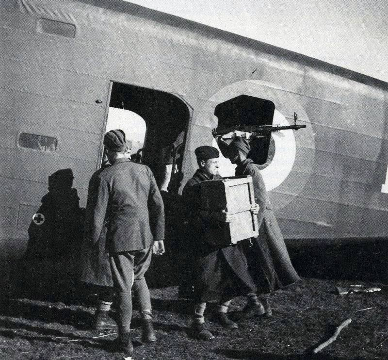 Savoia Marchetti SM.82 Marsupiale dell'Italian Co-belligerent Air Force